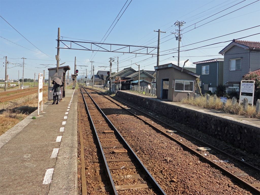 富山地方鉄道本線早月加積駅ホーム